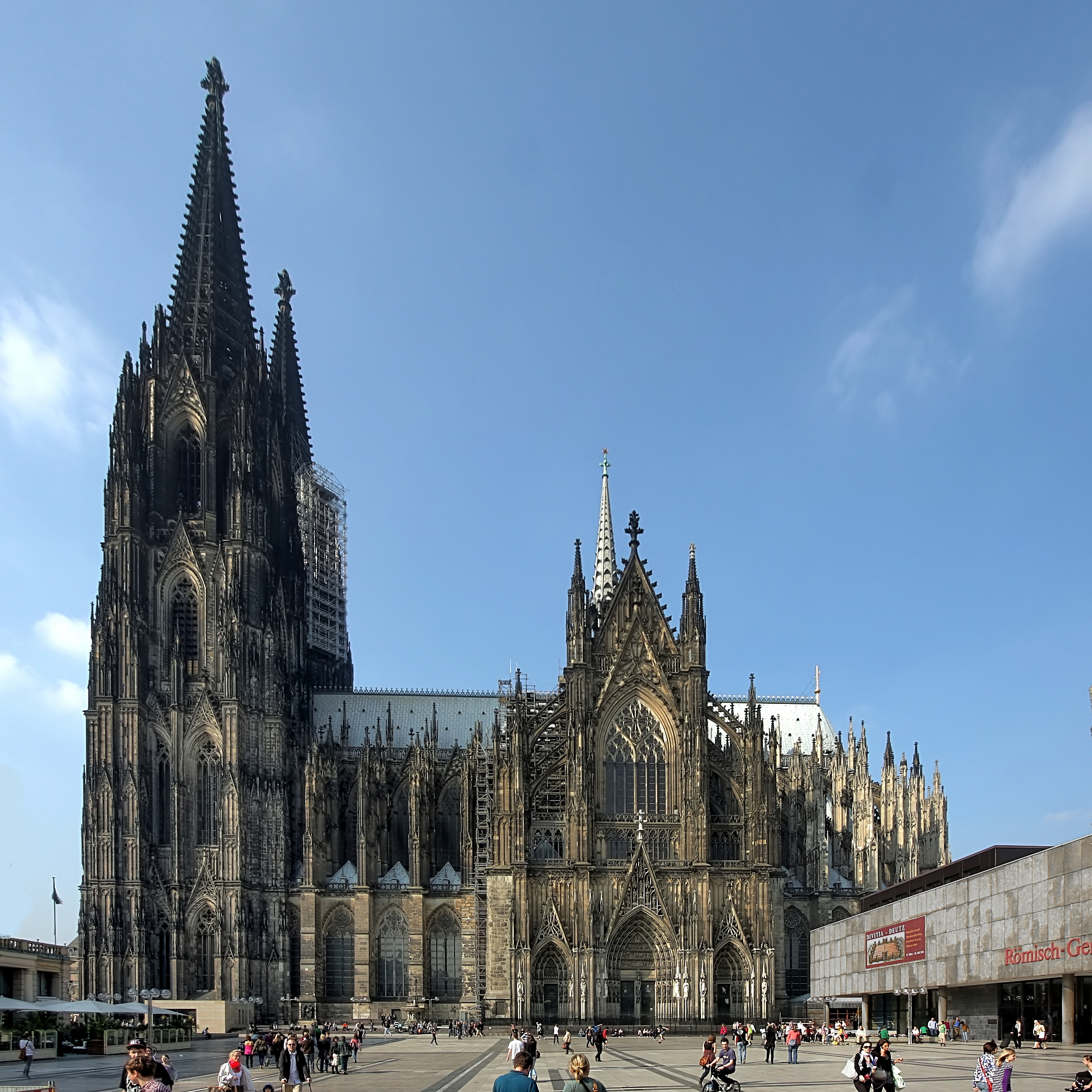 Kölner Dom, Südseite. This is a photograph of an architectural monument.